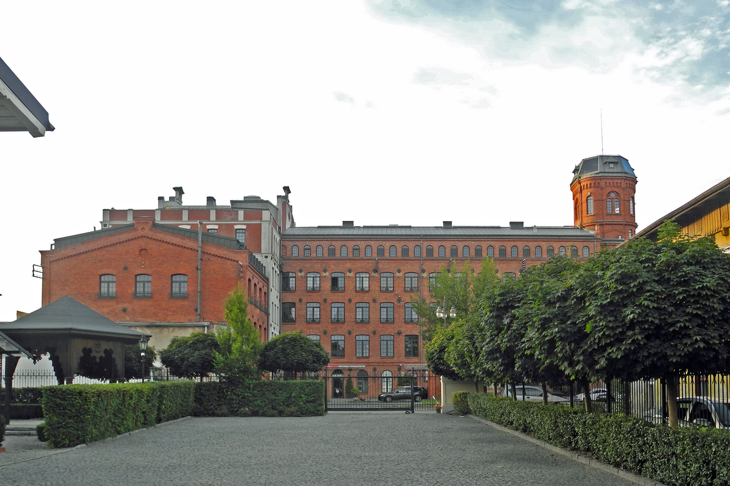 Alte Spinnerei – Stara Przędzalnia in Żyrardów, errichtet 1833, Architekt: Jan Jakub Gay (1801–1849), nach dem Umbau zum Wohn- und Servicegebäude 2005 bis 2009 durch die Familie Anna und Piotr Błażejewski